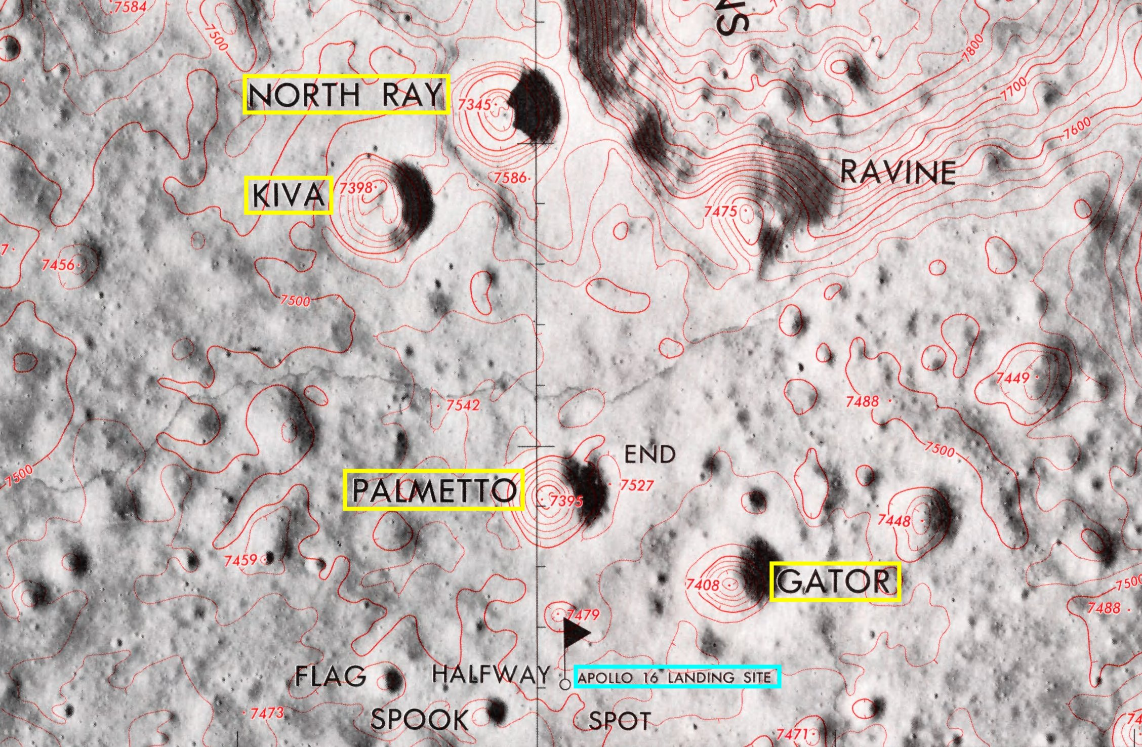 Lugar de aterrizaje del Apolo 16. (Lunar Topophotomap 78D2S1(50) Apollo 16 Landing Area)